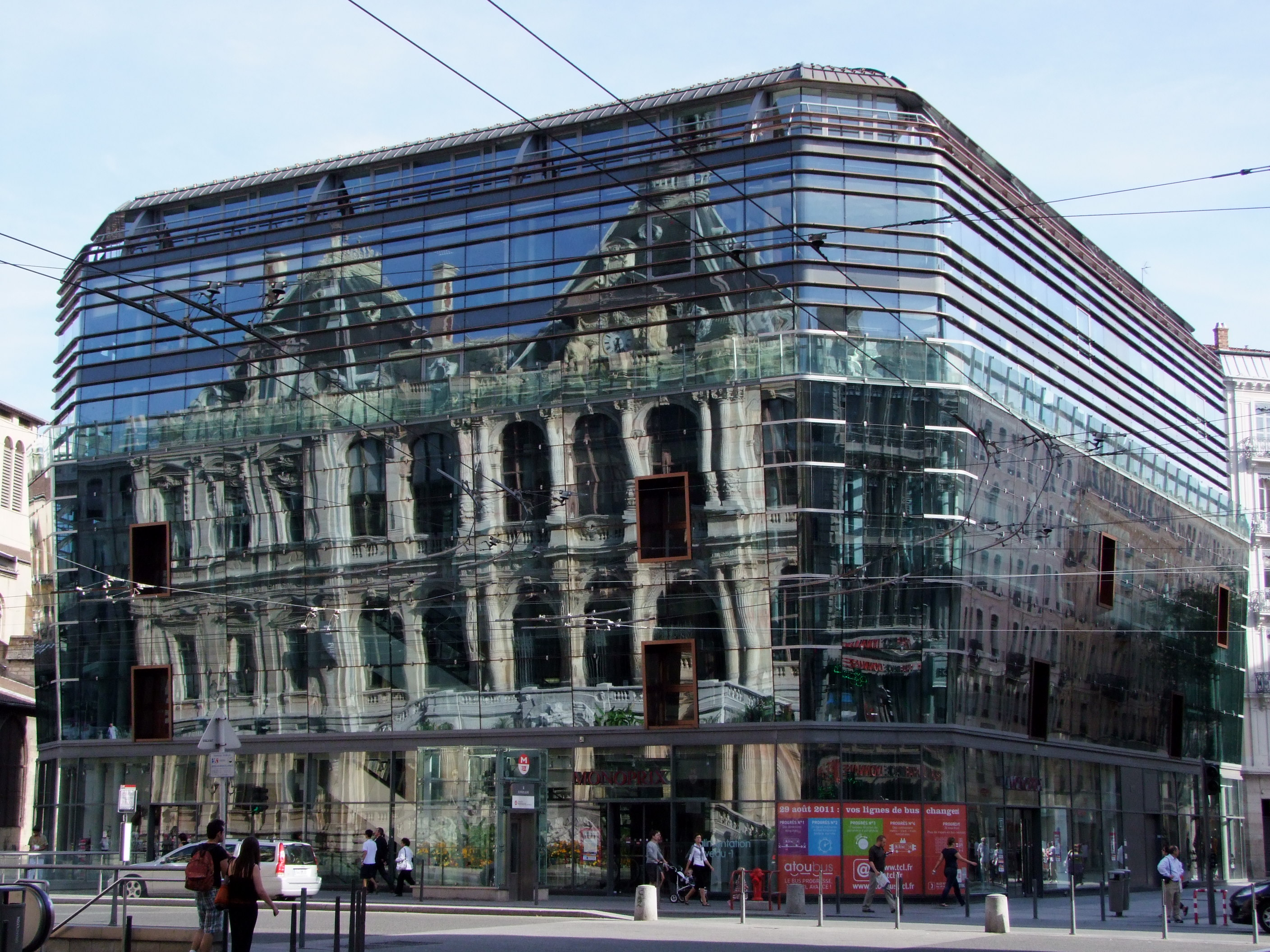 Lyon